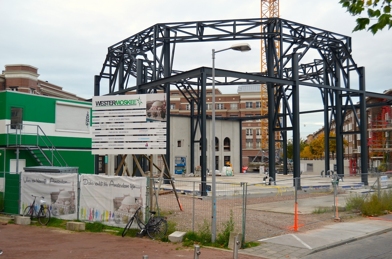 Westermoskee in aanbouw, gezien vanaf de Baarsjesweg. De tekst op de spandoeken links luidt: Voor een kleurrijk Amsterdam en Daha renkli bir Amsterdam için, wat in het Turks hetzelfde betekent.